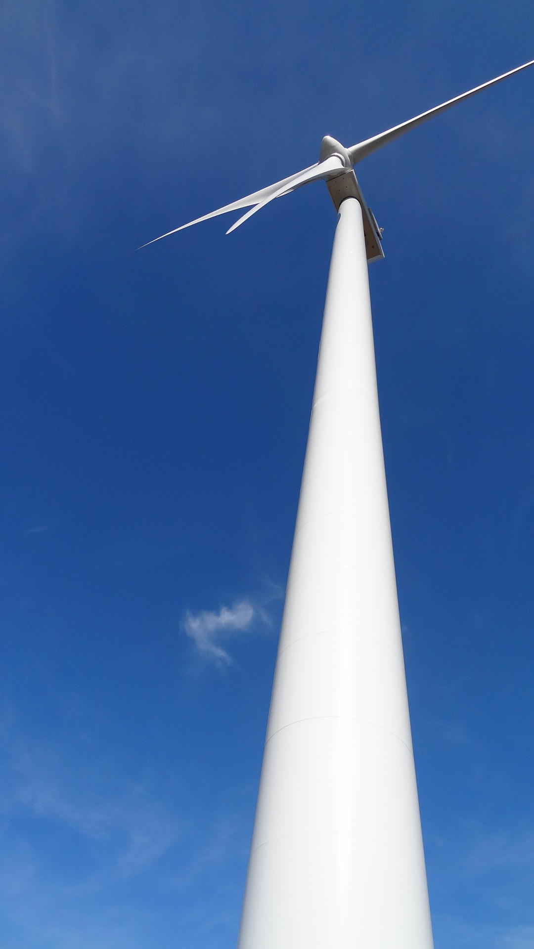 Eolienne du parc des Deux Rivières en Lorraine